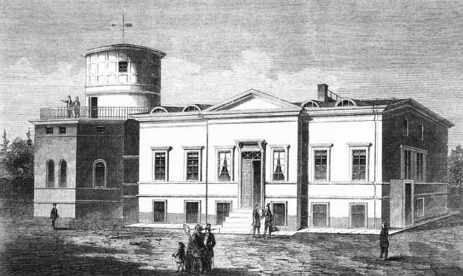 Neue Sternwarte Leipzig im Johannistal mit Wohnhaus des Direktors Karl Christian Bruhns; Ansicht von Norden nach einem Holzstich aus dem Jahr 1861; Architekt: Albert Geutebrück